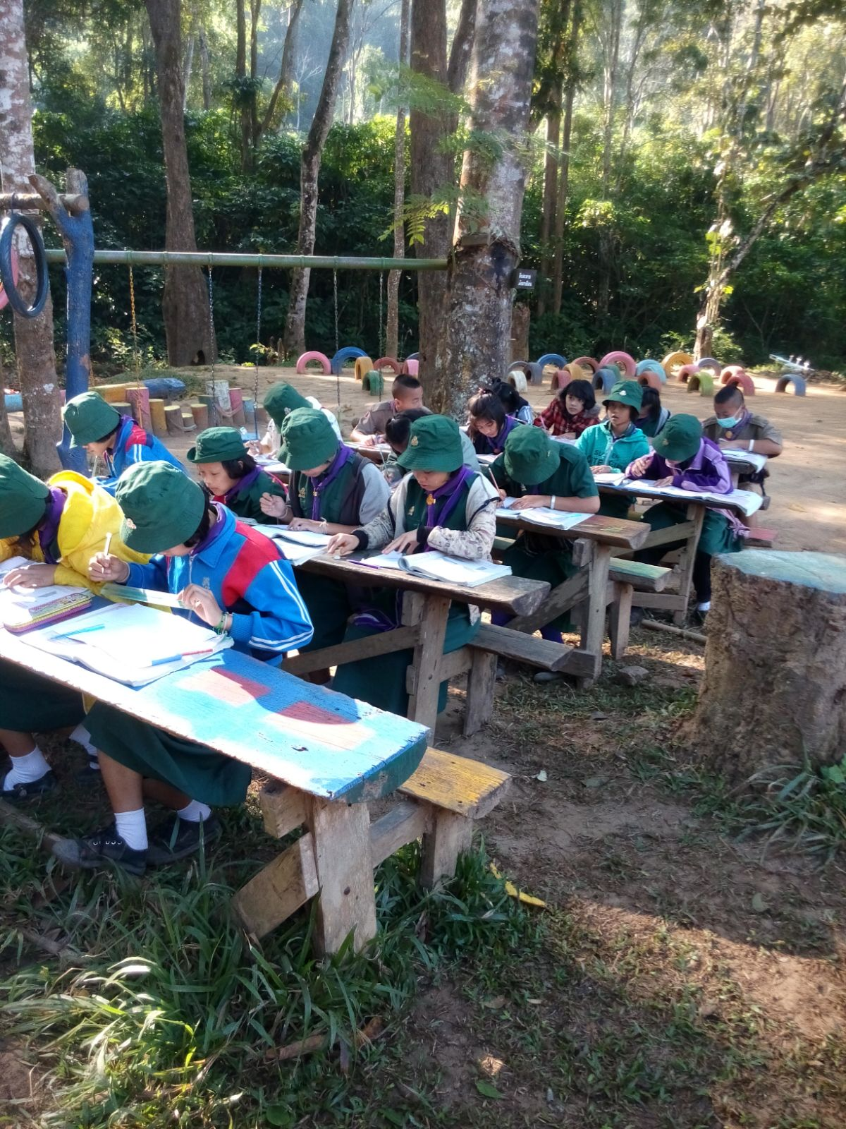 在泰国山上的小学